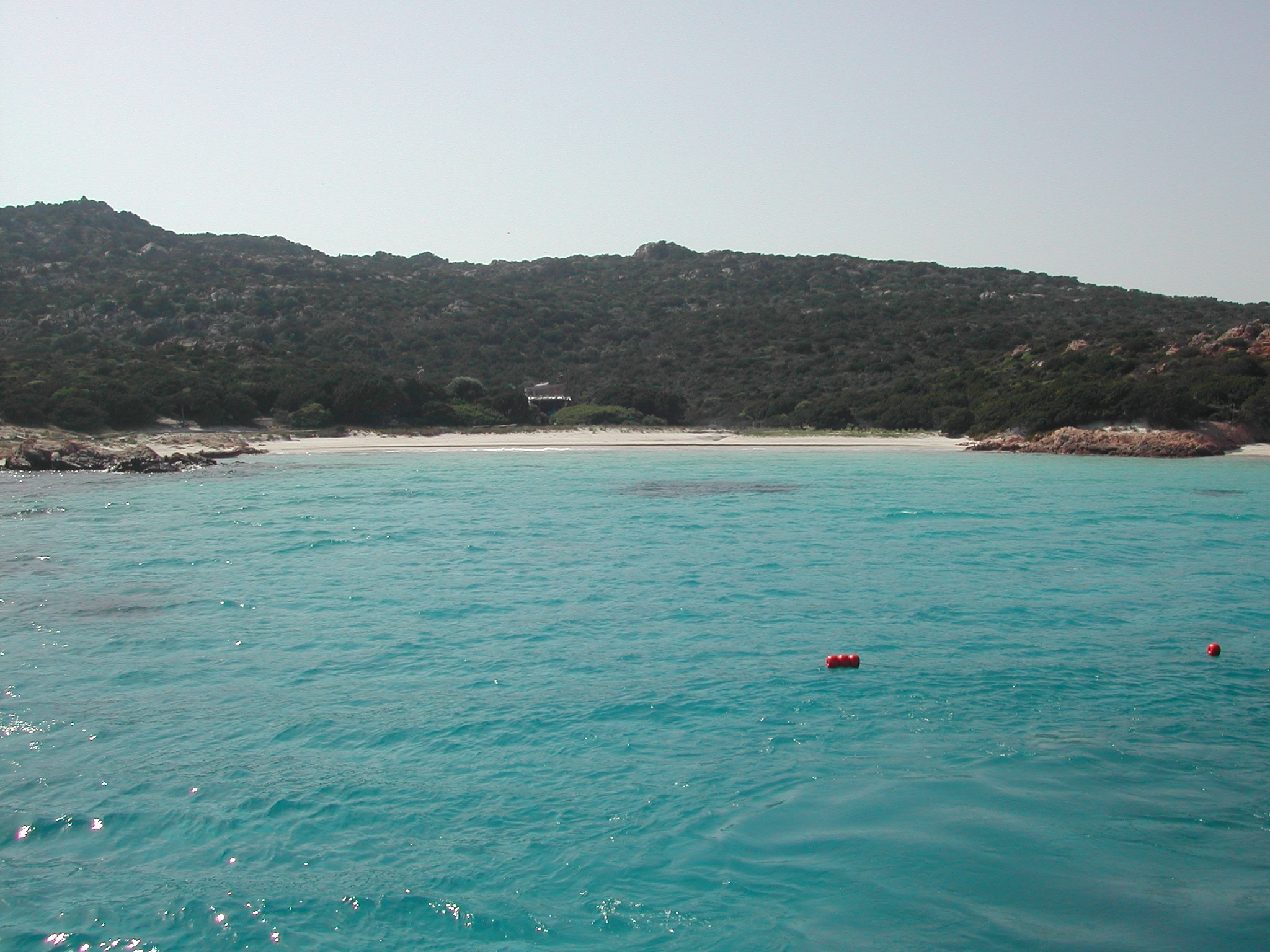 La Spiaggia Rosa nell'Isola di Budelli